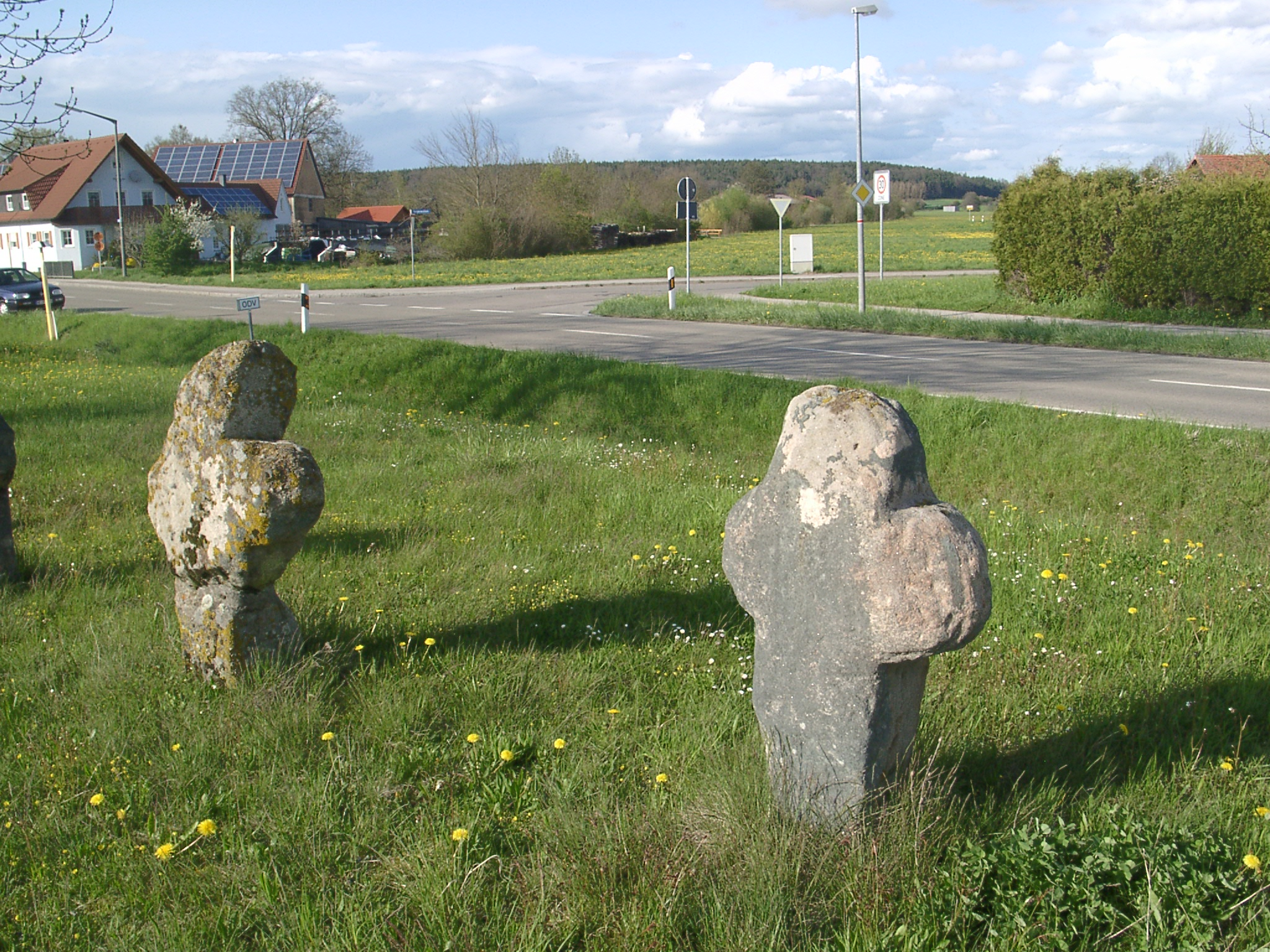 Neunstetten